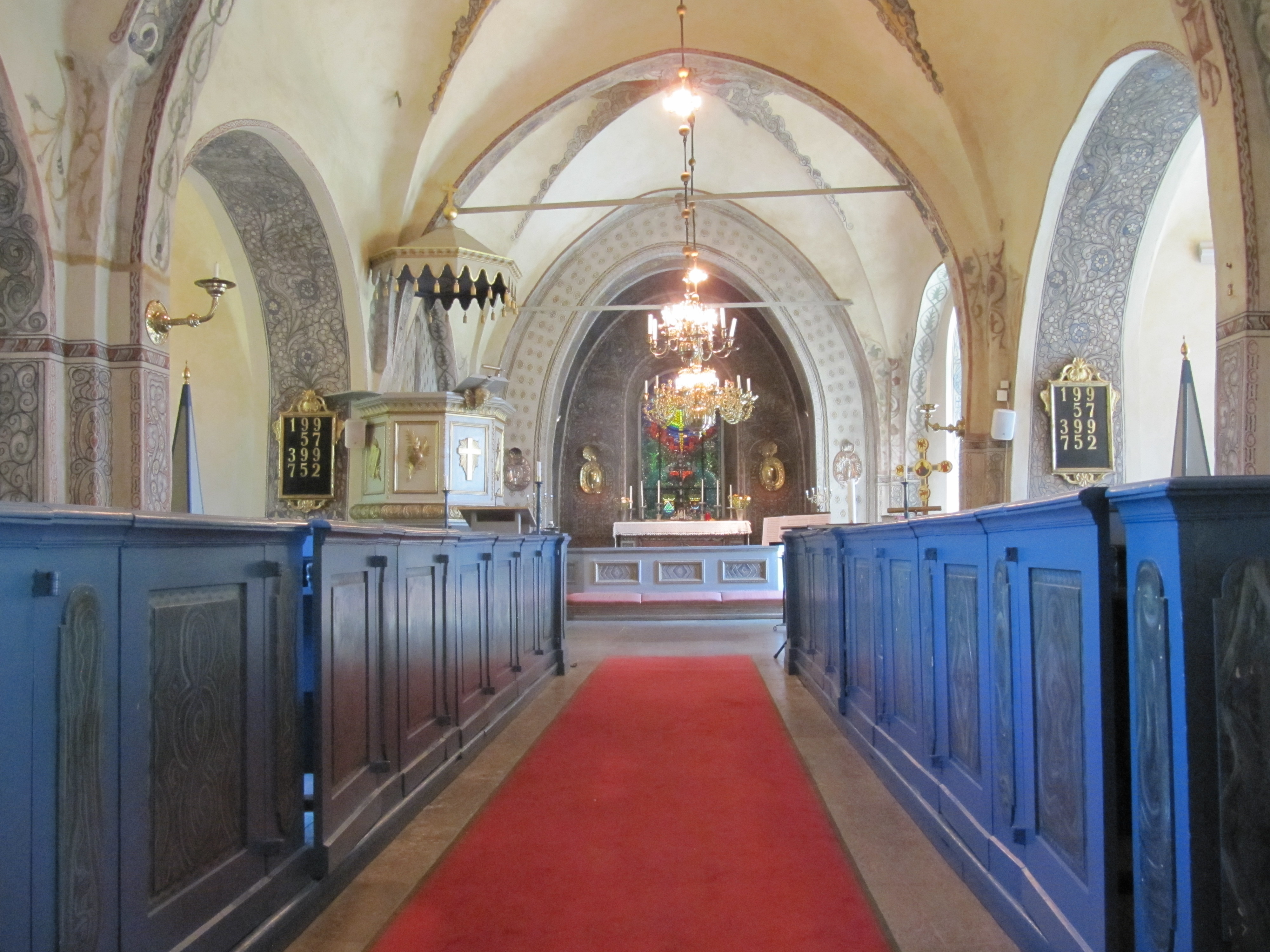 Kyrkorum i Alsike kyrka